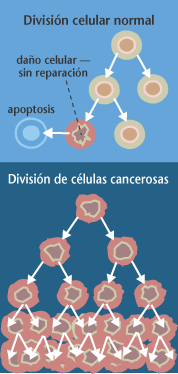 Procede de NIH (Instituto Nacional de Salud Americano) Tomada de: NIH